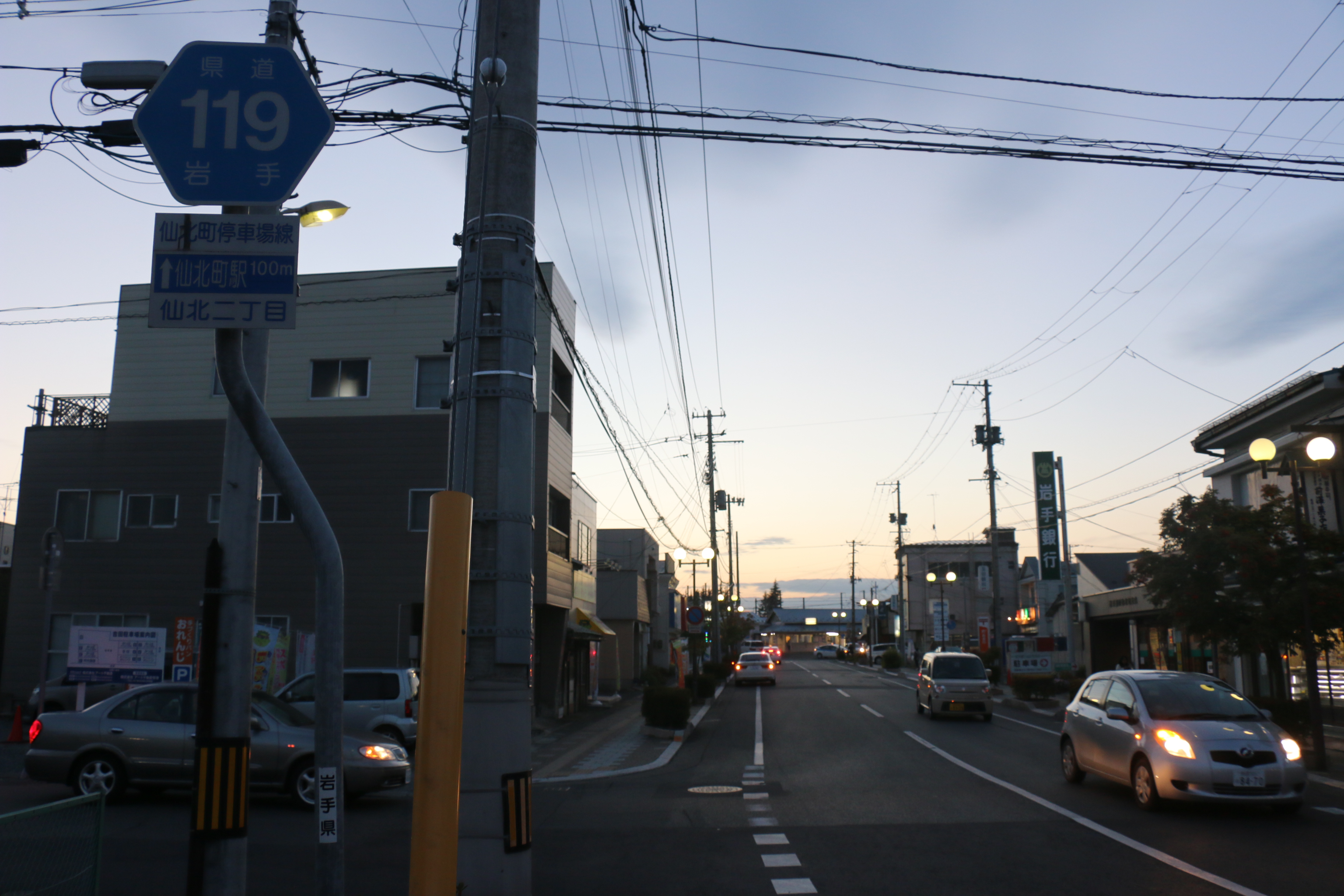 岩手県道119号線 終点付近